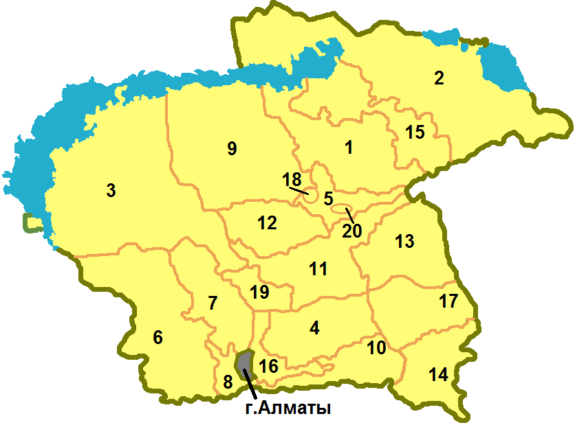 Район и города областного подчинения Алматинской области Казахстана